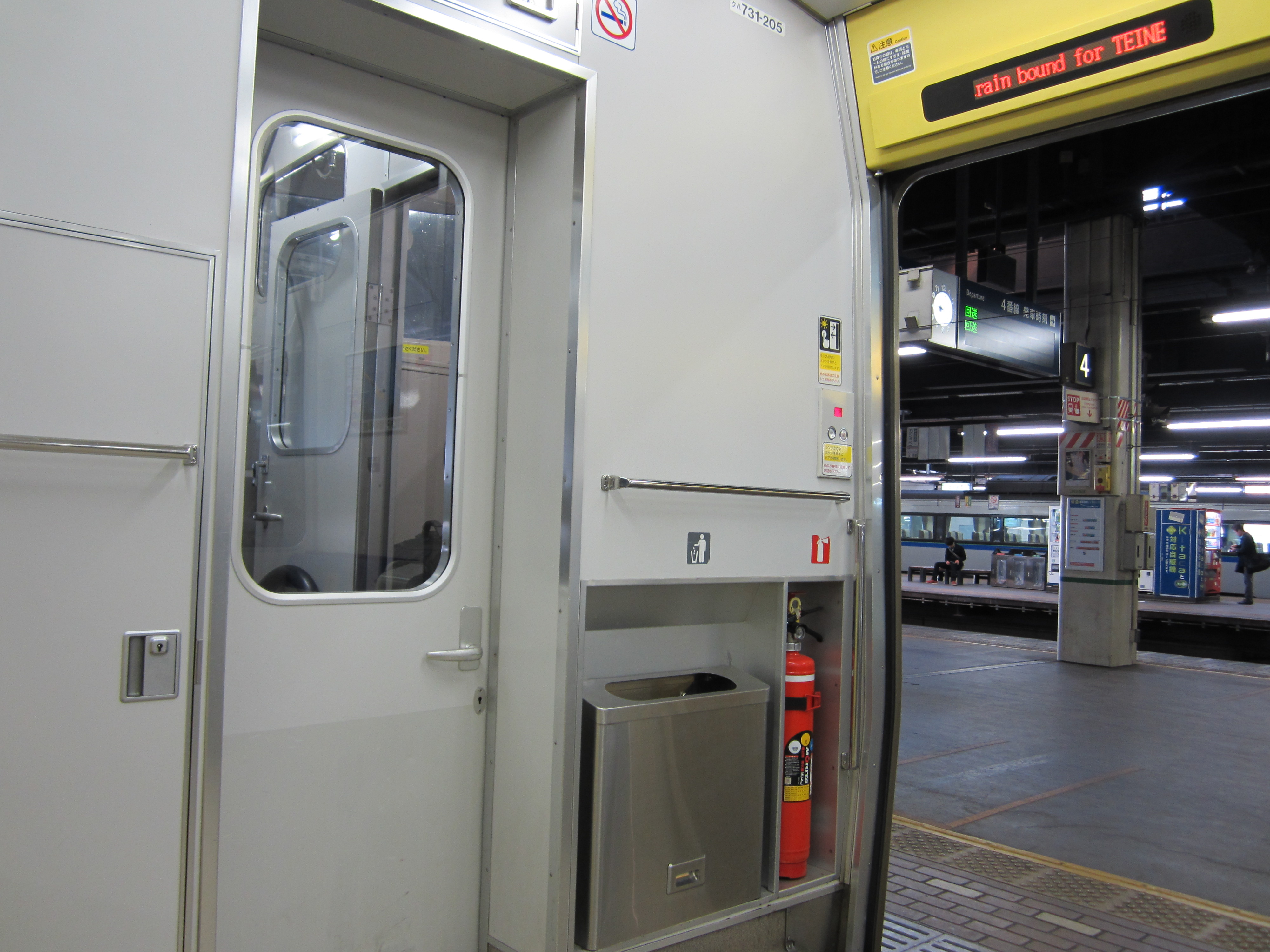 JR北海道731系電車運転室付近